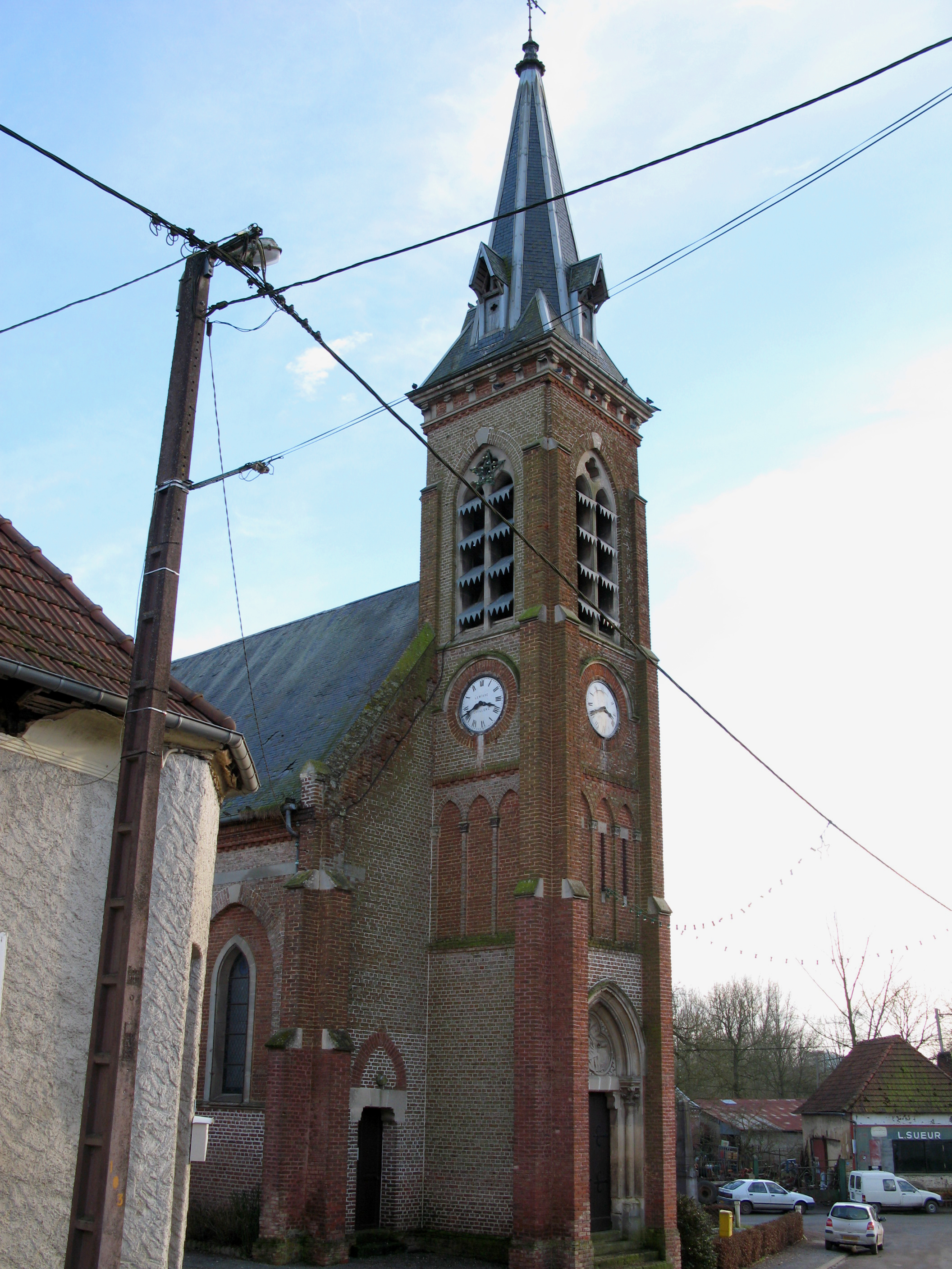 Occoches (Somme, France) - Vue partielle de l'église. Chaque abat-son du clocher est protégé par une feuille de zing dont le rebord est dentelé. Le fabriquant et installateur de l'horloge est "LEMOINE à Doullens". L'émail du cadran Ouest de cette horloge est fortement "usé" par les intempéries.